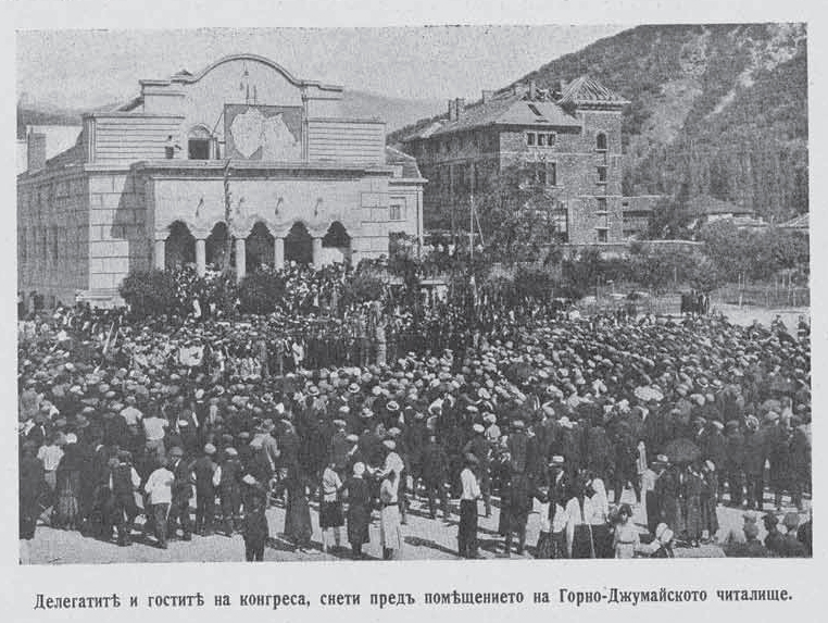 Gorna Dzhumaya kongres of MMS, 1932